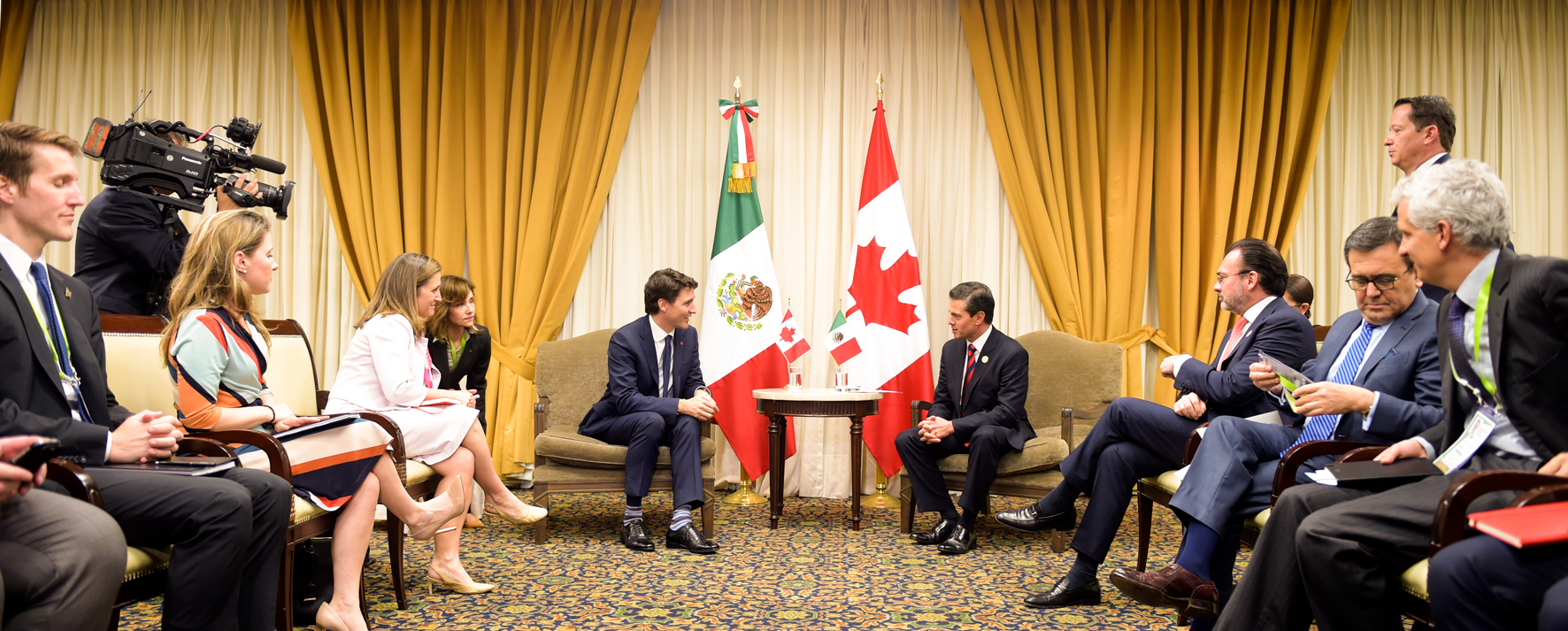 JCH_4930